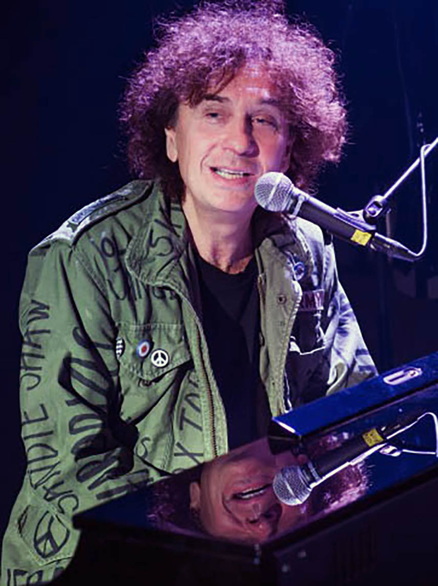 Artisten Magnus Uggla.